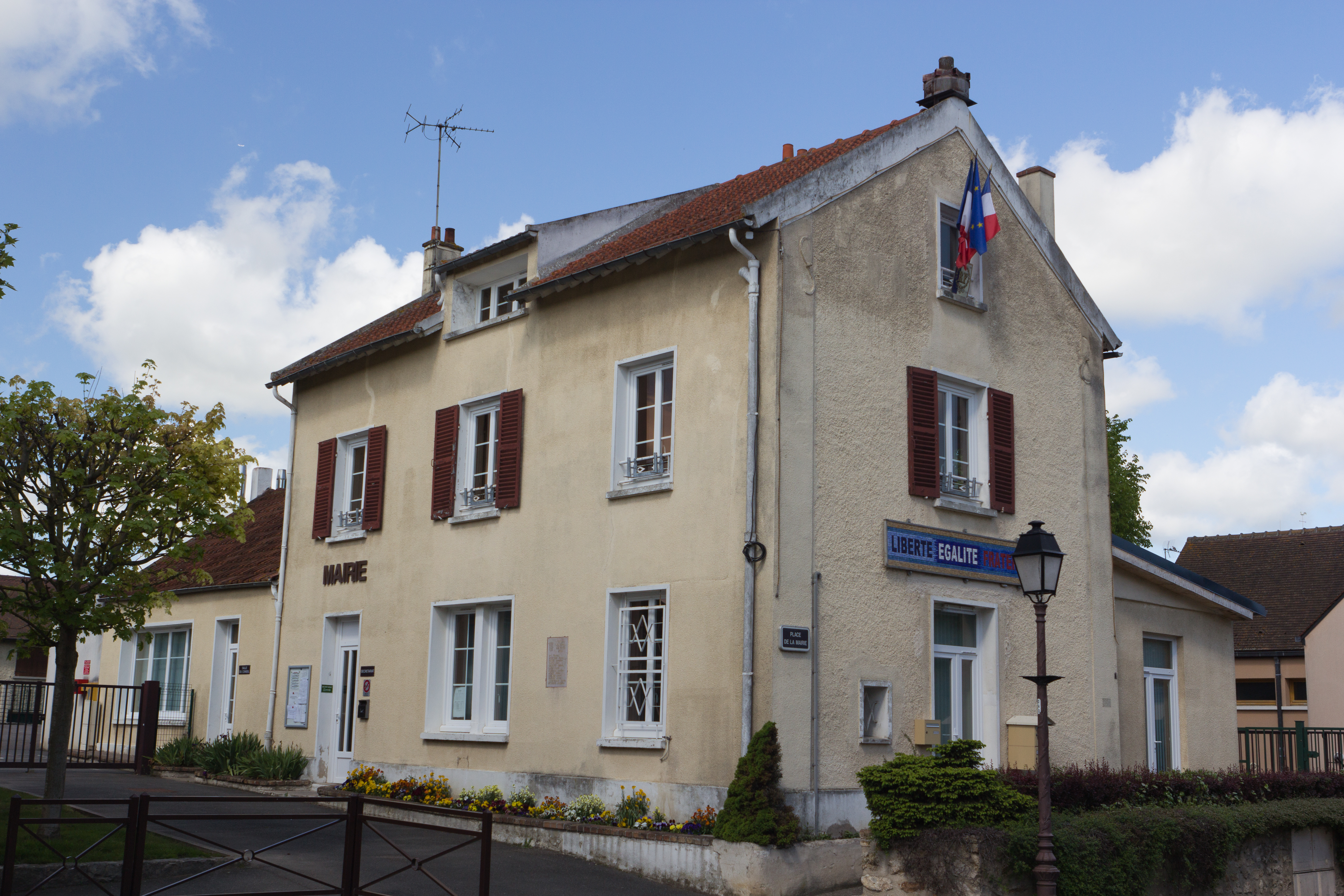 Mairie de Fontenay-le-Vicomte, Fontenay-le-Vicomte, département de l'Essonne, France